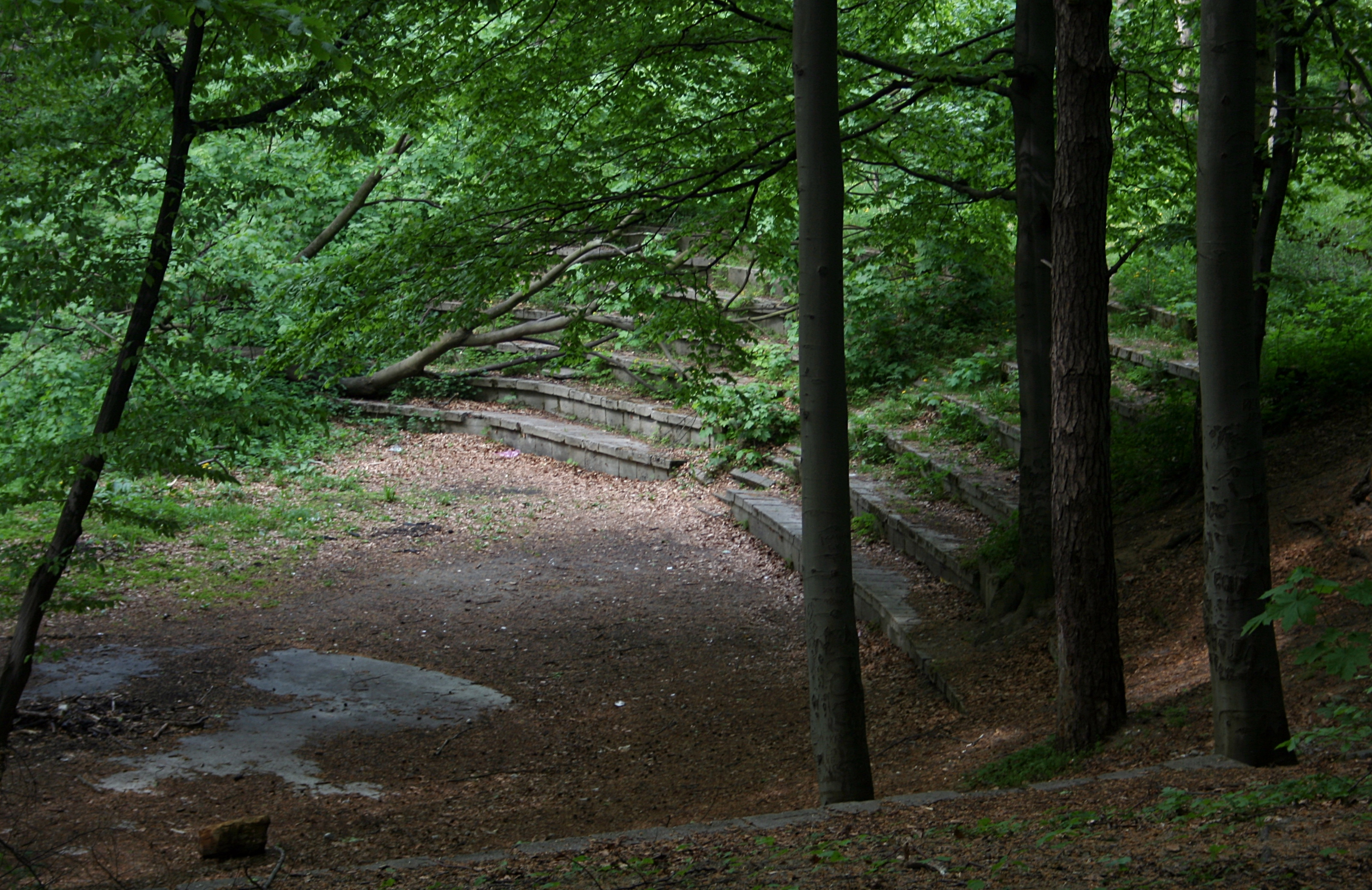 Pozostałości amfiteatru w rezerwacie przyrody Parkowe w pobliżu Złotego Potoku